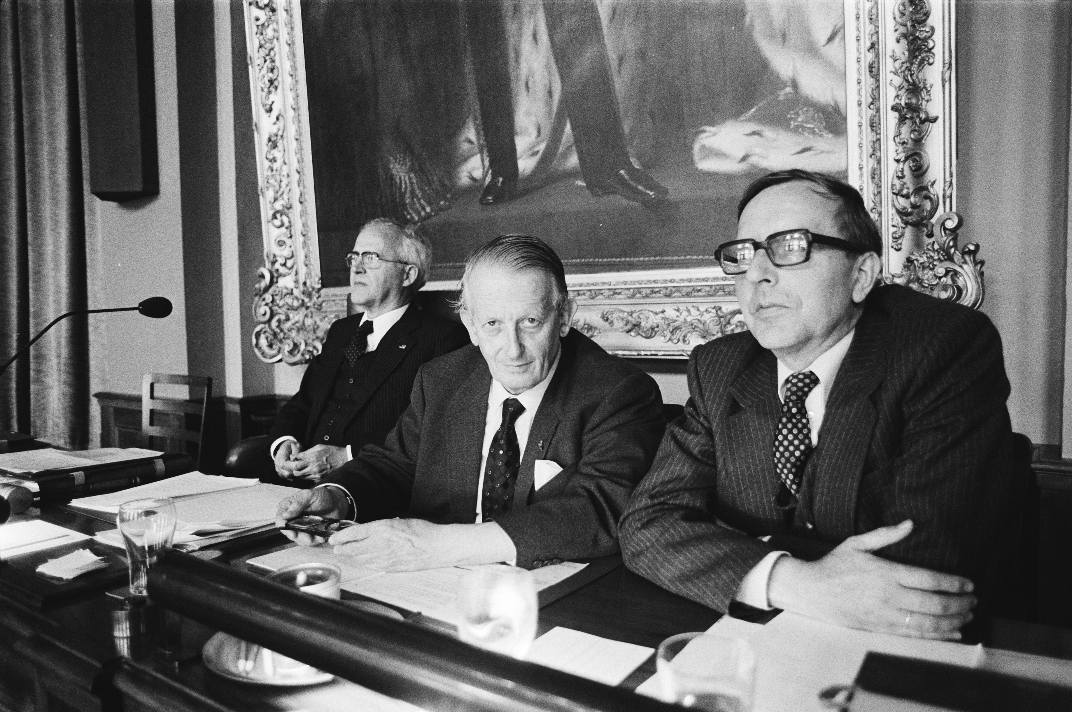 Collectie / Archief : Fotocollectie Anefo Reportage / Serie : [ onbekend ] Beschrijving : Eerste Kamer; v.l.n.r. voorzitter Thurlings, griffier jhr.mr. J.W. Roell en zijn opvolger griffier drs. A. Spreij Datum : 24 juni 1980 Trefwoorden : griffiers Persoonsnaam : Thurlings, Theo Fotograaf : Dijk, Hans van / Anefo Auteursrechthebbende : Nationaal Archief Materiaalsoort : Negatief (zwart/wit) Nummer archiefinventaris : bekijk toegang 2.24.01.05 Bestanddeelnummer : 930-8946